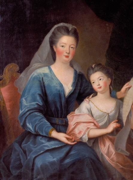 Description